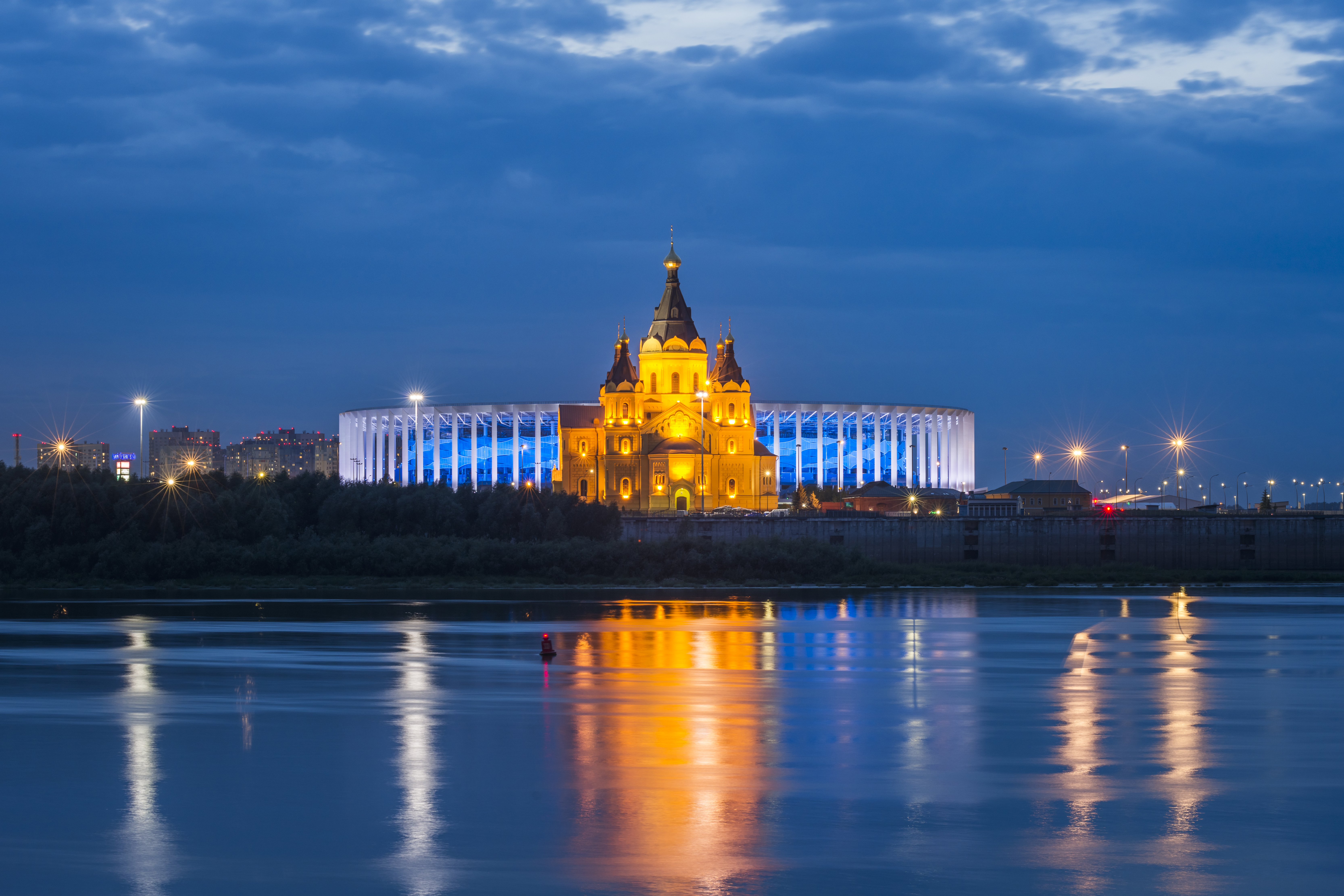 Ансамбль собора Александра Невского: улица Стрелка, 3, Нижний Новгород, Нижегородская область